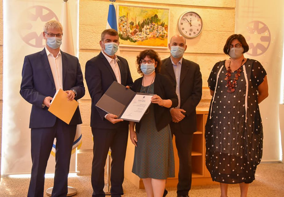 סגל משרד החוץ בראשות גבי אשכנזי מברך את גב' חגית בן יעקב על מינויה כשגרירה בפינלנד 2 באוגוסט 2020